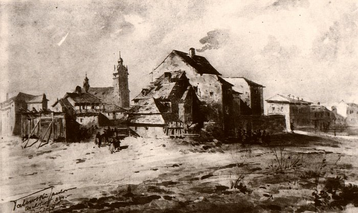 Teodor Talowski, akwarela, 1895 (widok na Kazimierz, na dzisiejszą ulicę Miodową)